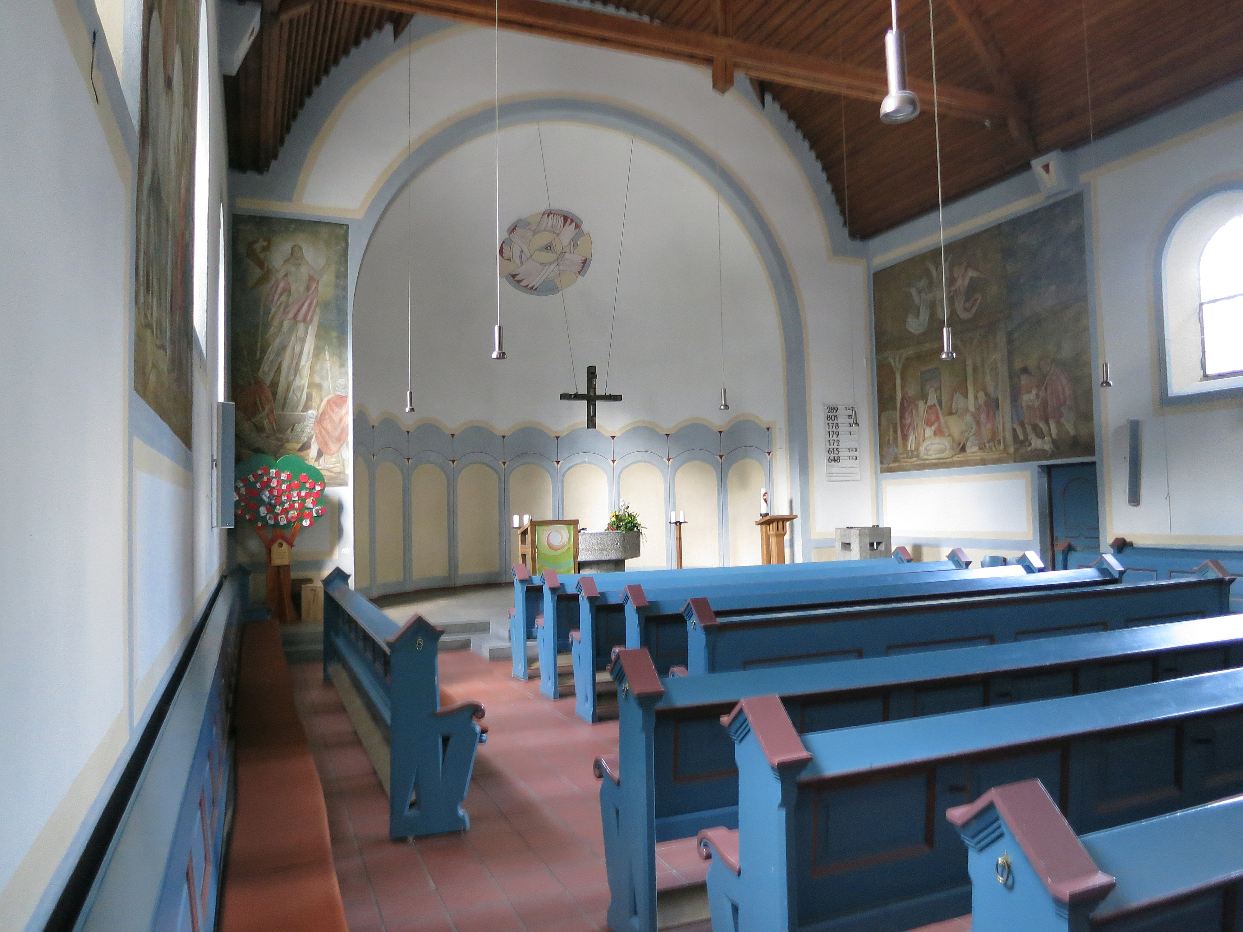 Kreuzkirche (evangelisch) in Pfaffenhofen an der Ilm. Langhaus, Blick nach NordOst